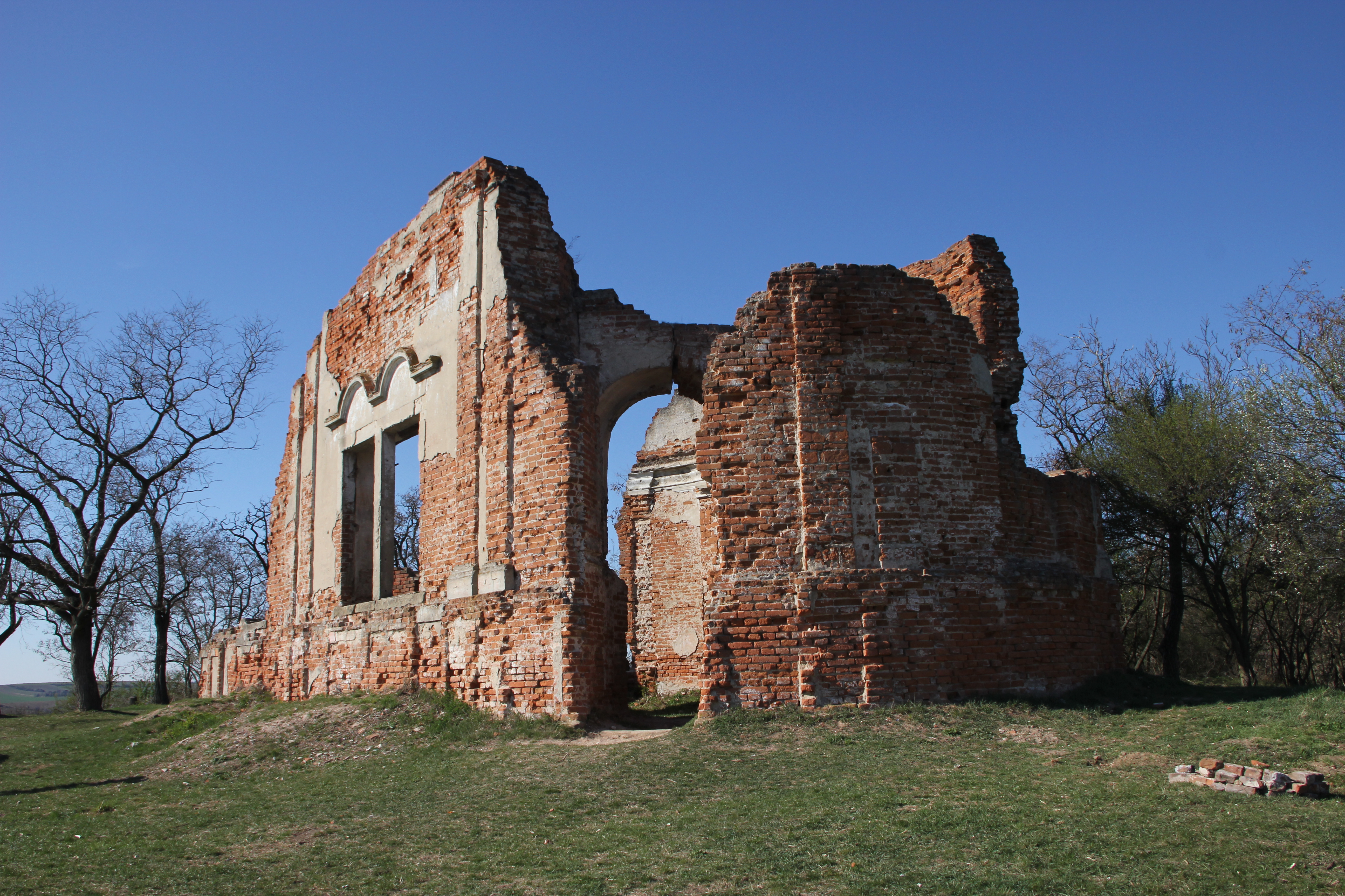 Zřícenina kaple sv. Floriána a Šebestiána na kopci Starý hrad nad Bzencem, zničené roku 1945. Pohled od jihovýchodu.